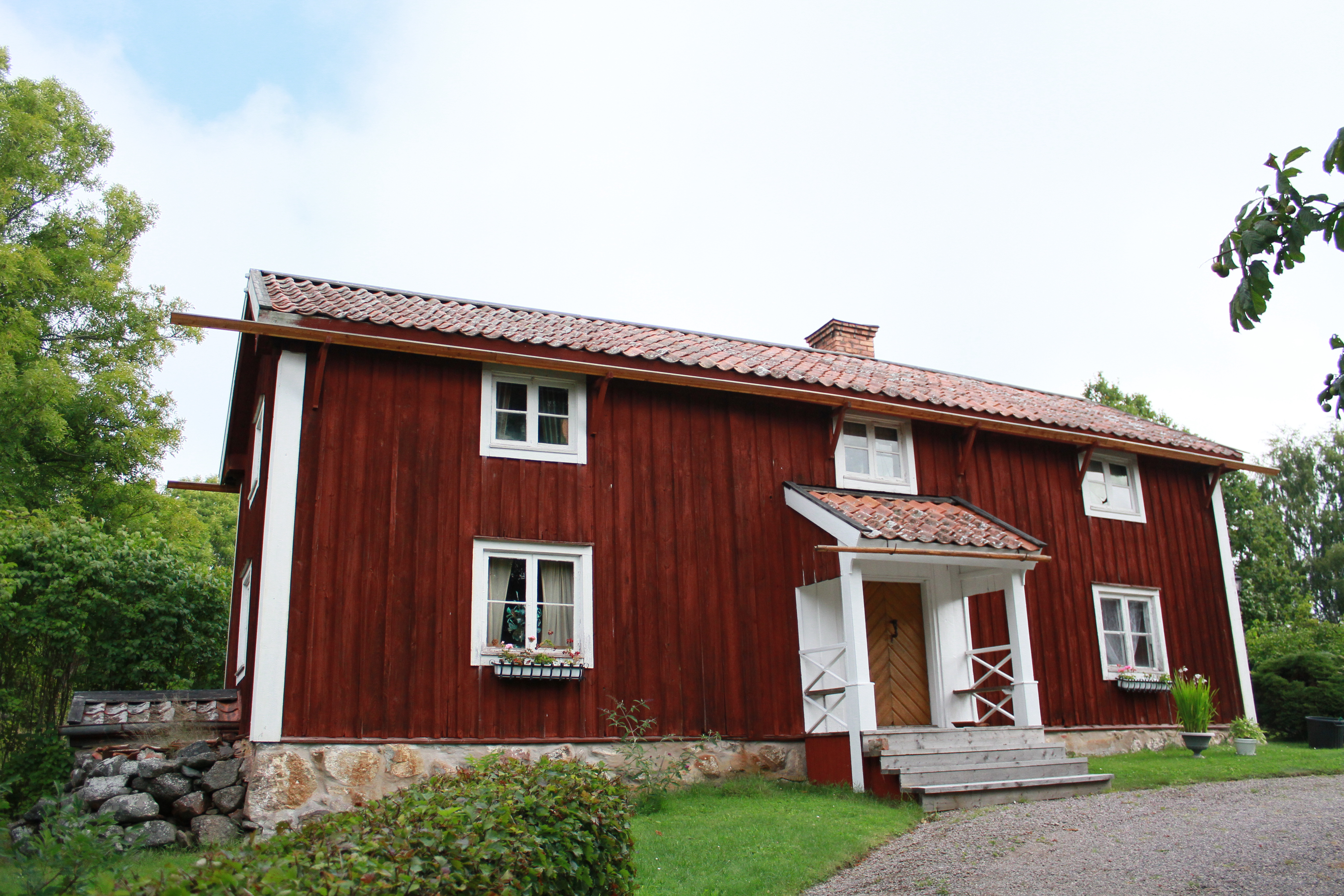 Exteriör från söder